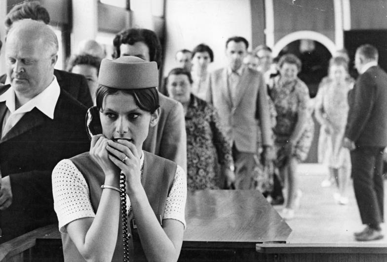 Berlin, Fernsehturm, Eingang, Besucher Zentralbild Koard 30.6.1970-osd-Berlin: Sdrastwutje, Bonjour, Guten Tag" - so begrüßt Annerose Peschke, jüngste Hosteß des Fernsehturms, die Besucher. Der Andrang ist oft so groß, daß der Einlaß gesteuert werden muß. So entstehen keine langen Wartezeiten und die Kugel des Tums wird nicht überbelastet. Um auf die vielen Fragen der Besucher antworten zu können, muß Annerose die Geschichte Berlins kennen, Stadtbilder erklären und Sprachen beherrschen. In einem Fremdenführerlehrgang vervollkommnet sie ihr Wissen. (Bitte beachten Sie die Fotos J 0630-19,20,21-1N)